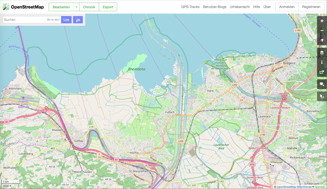 Screenshot des Geoportals von OpenStreetMap (CC BY-SA)